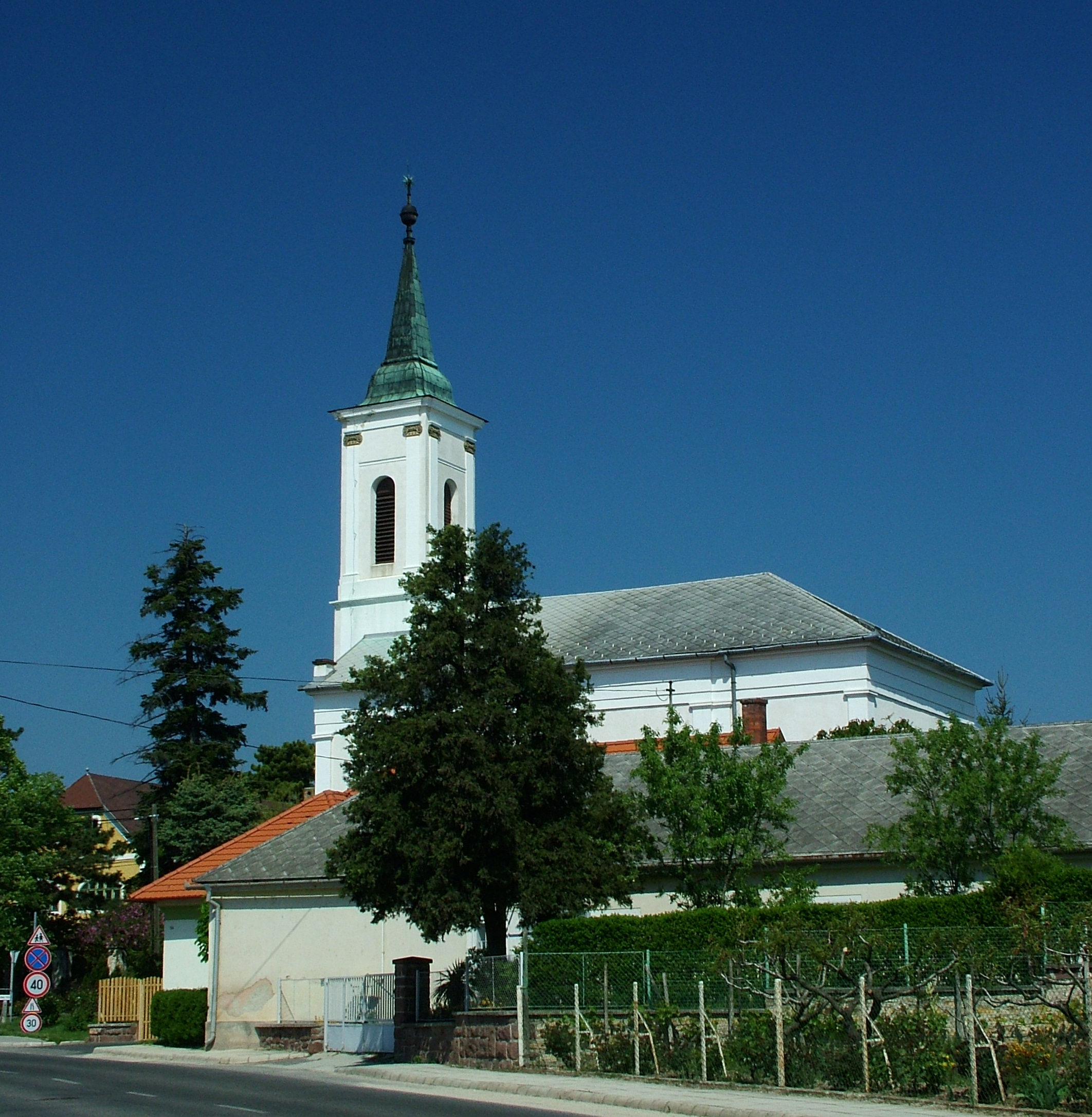 Református templom (Felsőörs)